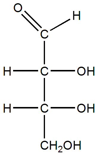 Erythrose en formule semi-développée